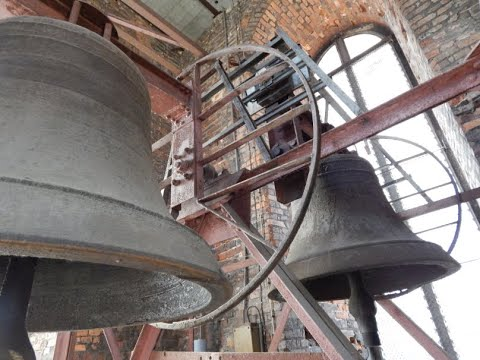 Dzwony Katedra Wrocław